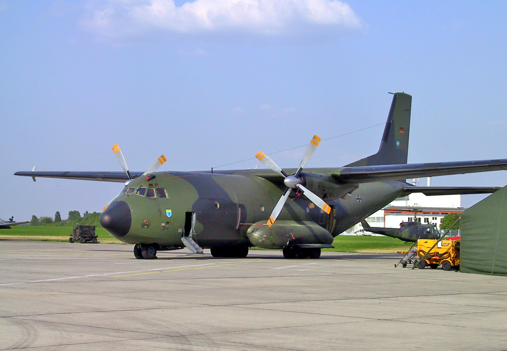 Eine Transall C-160 der deutschen Luftwaffe auf der ILA 2002.